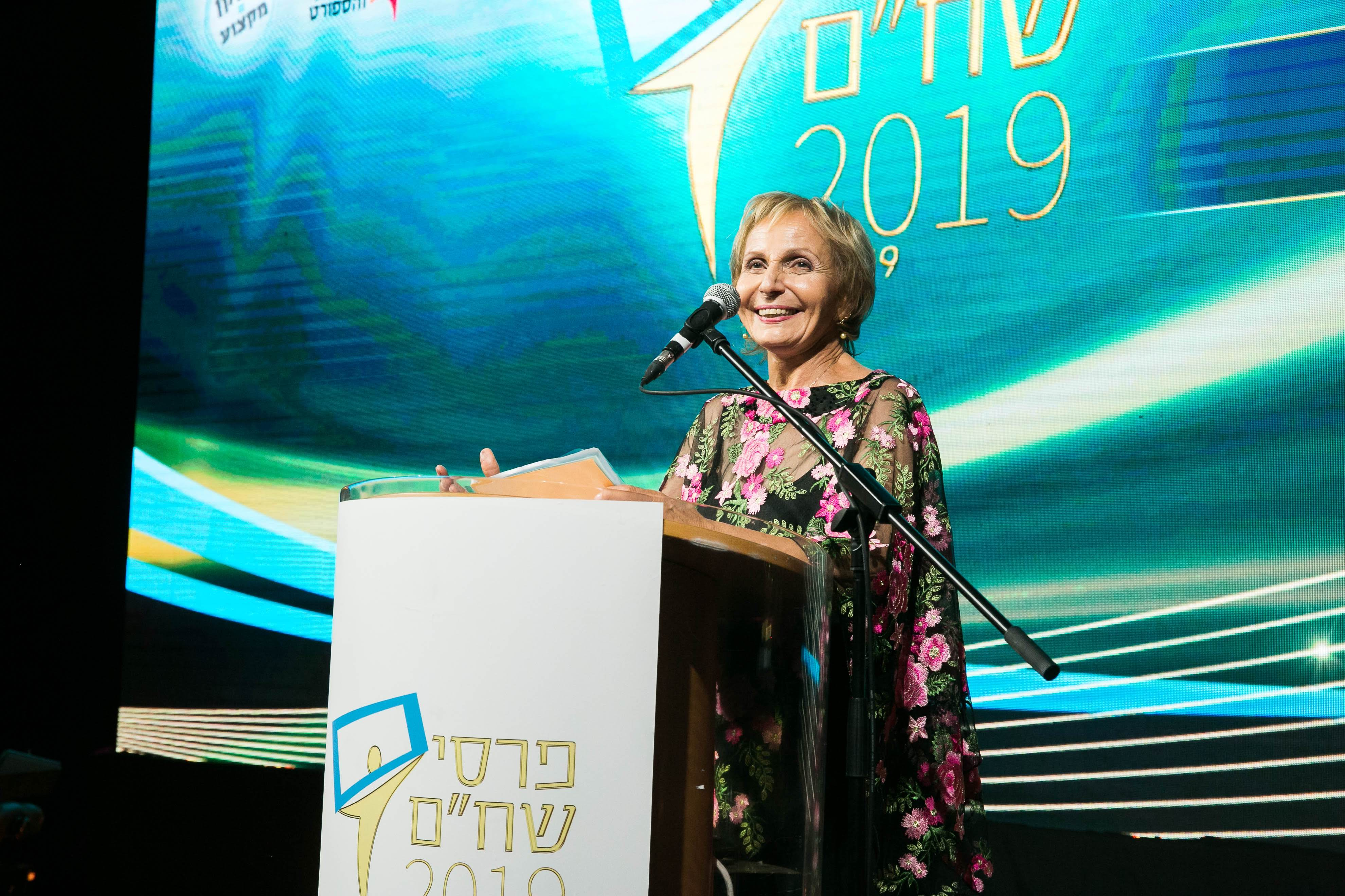 שושה גורן מקבלת את פרס שח"ם על מפעל חיים לשנת 2019